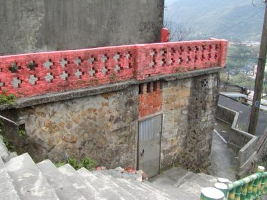 九份民宅。